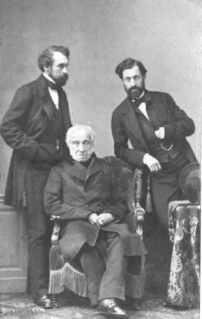 Adam Jerzy Czartoryski with his sons